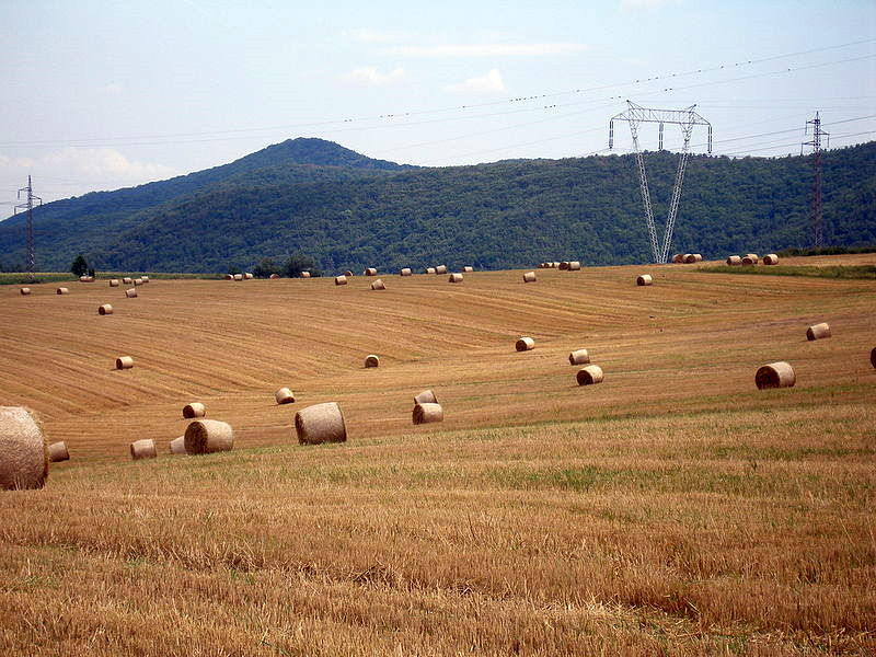 Chotár v obci Sedlice. Na tofli po žatve v roku 2007.Región Šariš, okr.Prešov.